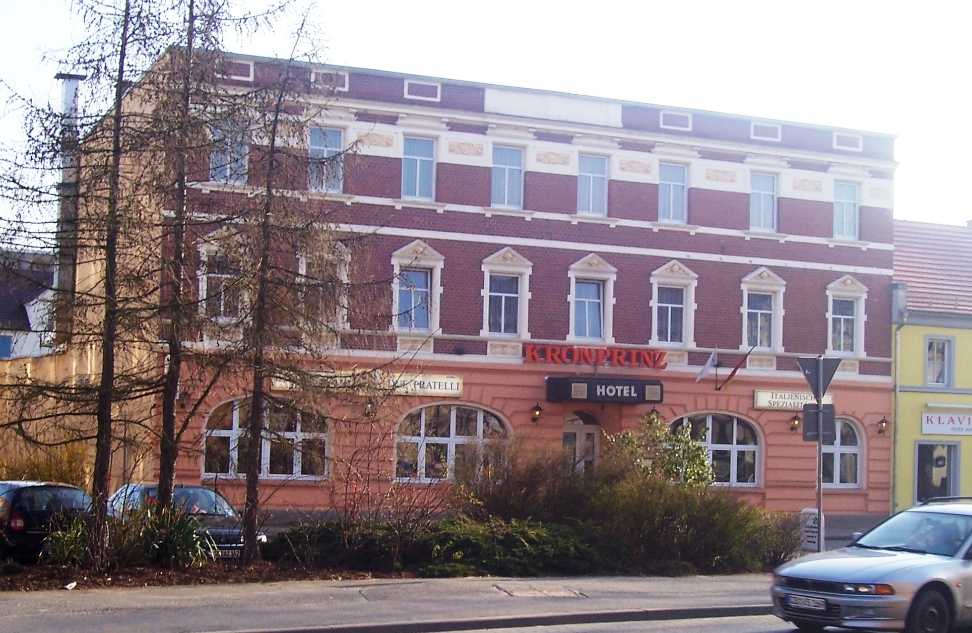 Hotel Kronprinz in Senftenberg, später auch als Hotel Glück Auf bezeichnet, heute wieder Hotel Kronprinz